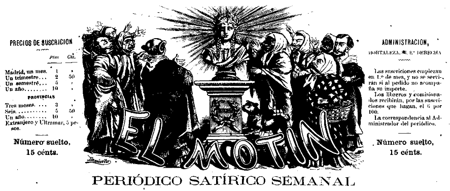 Cabecera del semanario satírico El Motín.